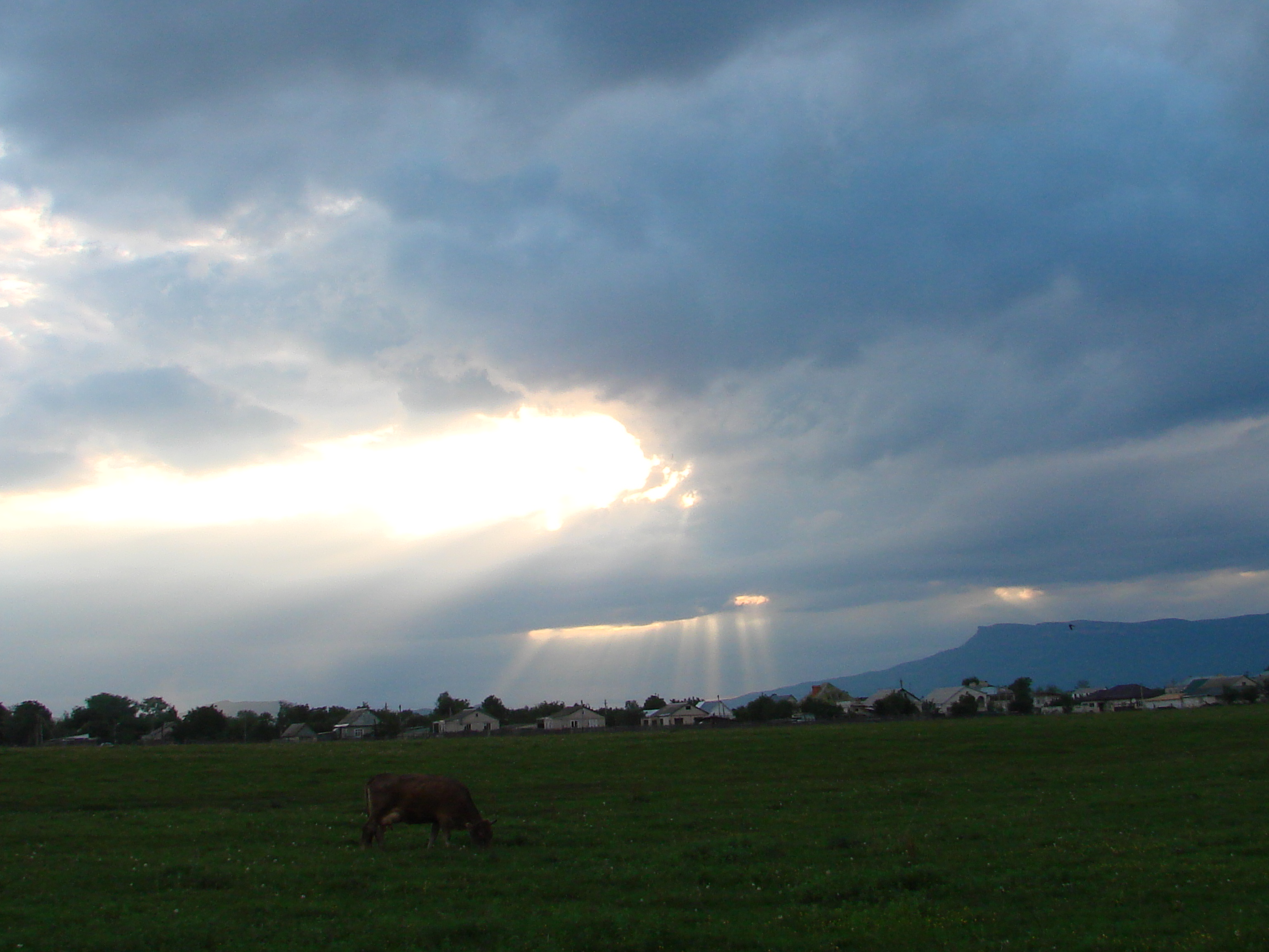 вечер